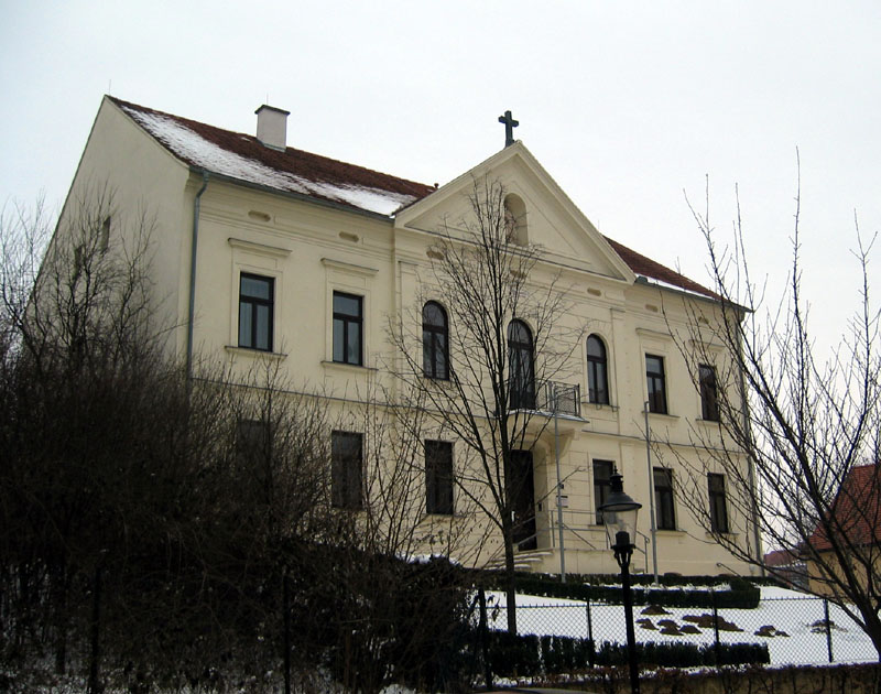 Pfarrhof in Pinkafeld, Burgenland, Austria